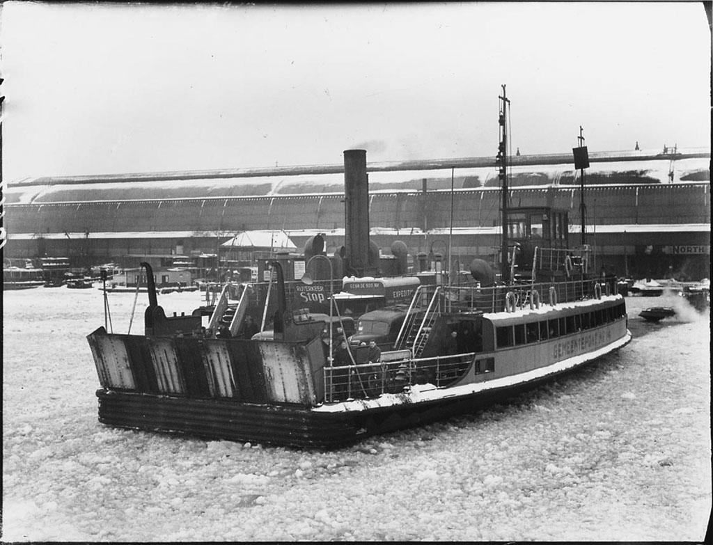 Veerpont door het bevroren IJ, 5 maart 1947 Foto Ben van Meerendonk / AHF, collectie IISG, Amsterdam